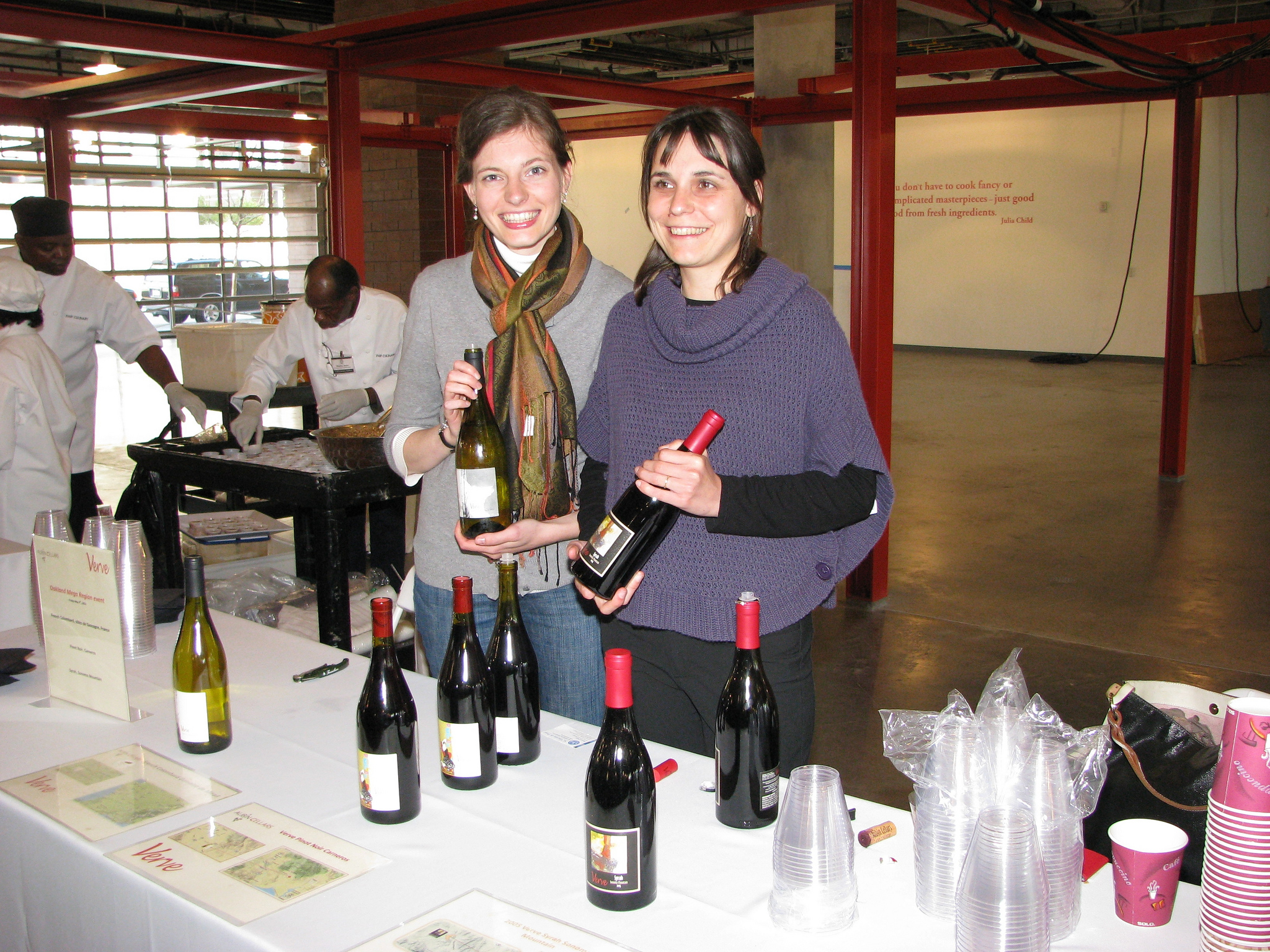 Présentation des vins de Aubin Cellars, Oakland